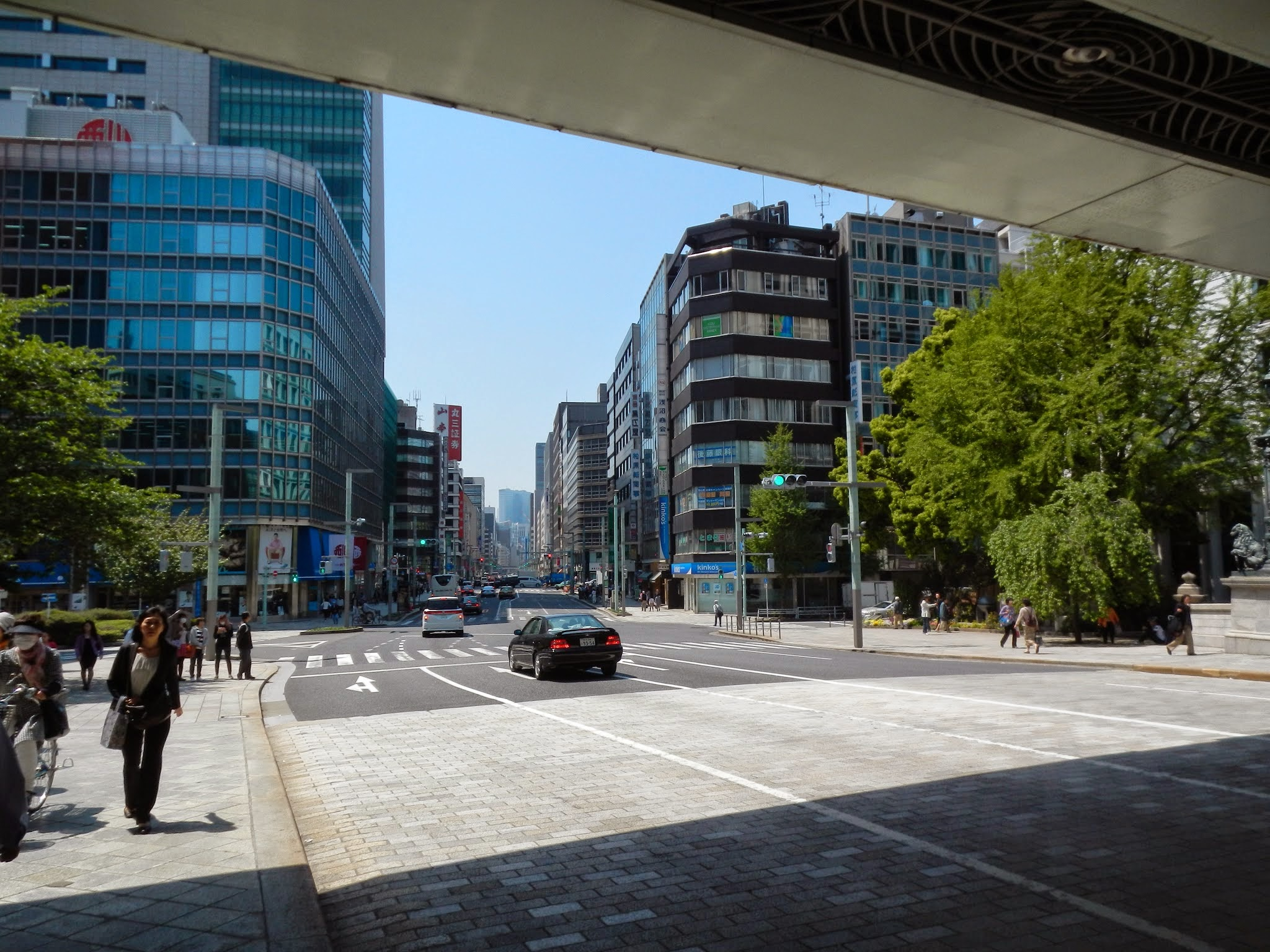 1 Chome Nihonbashi, Chūō-ku, Tōkyō-to 103-0027, Japan